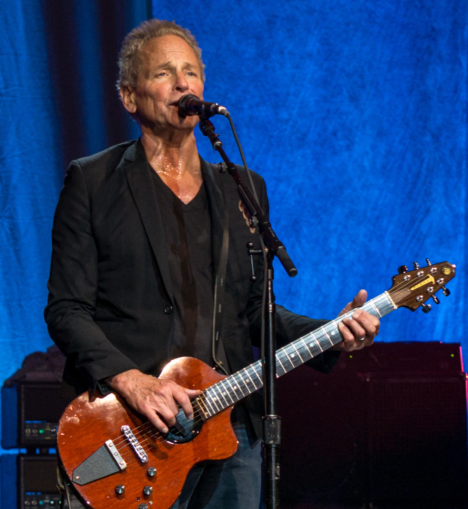 BuckMcVieOhio031117-42